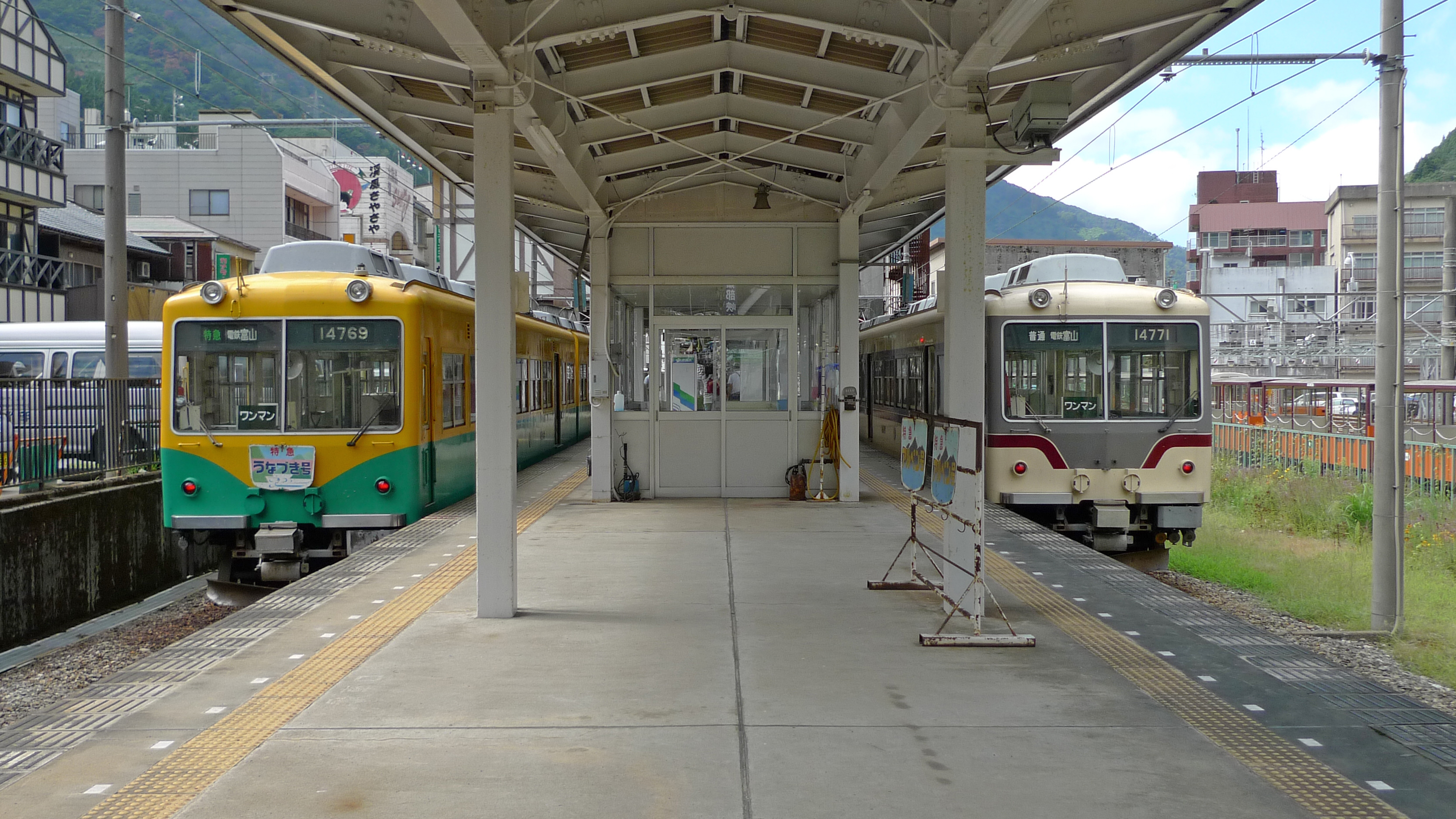 宇奈月温泉駅ホーム